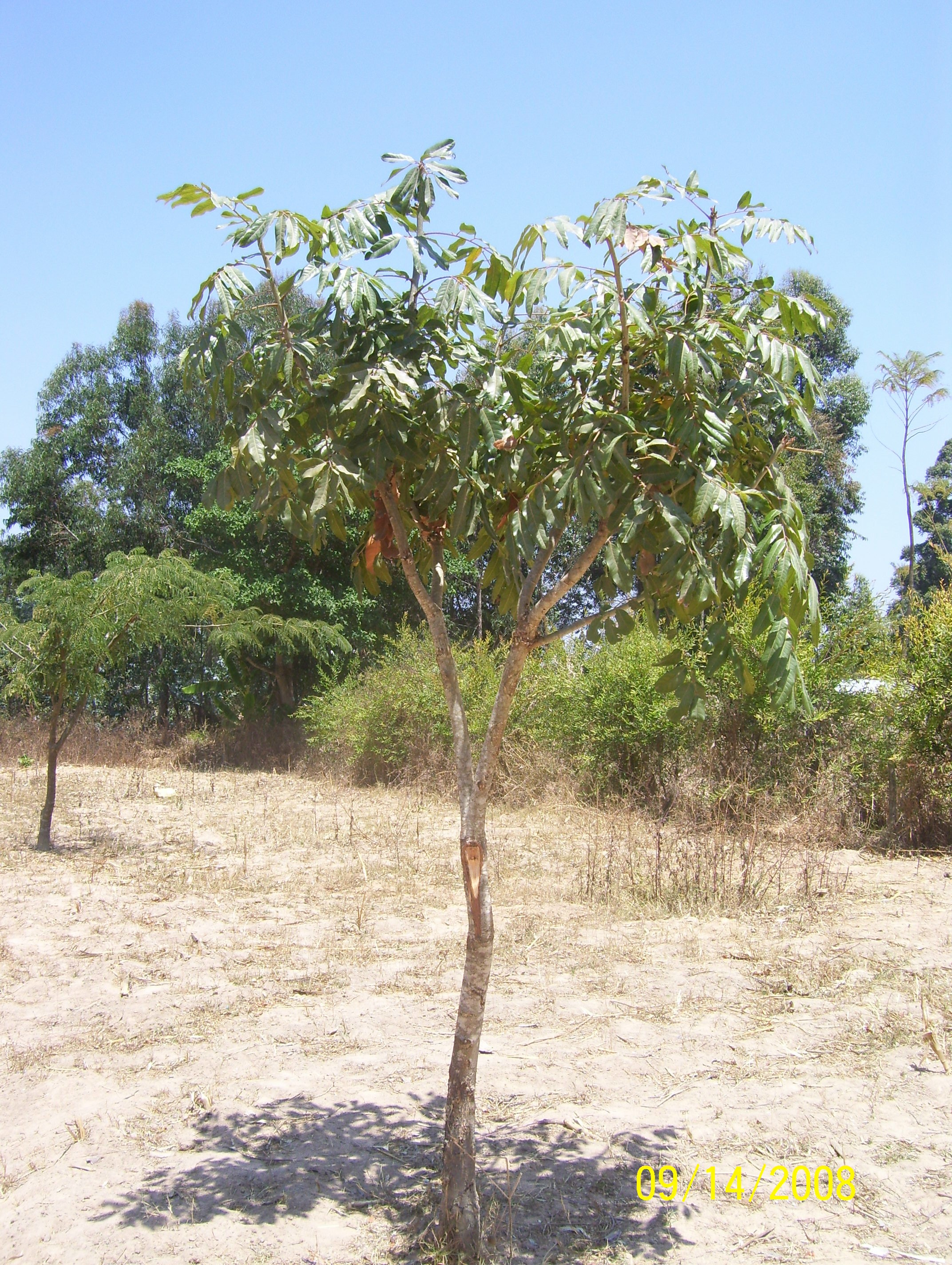 Khaya anthotheca, Tanzania